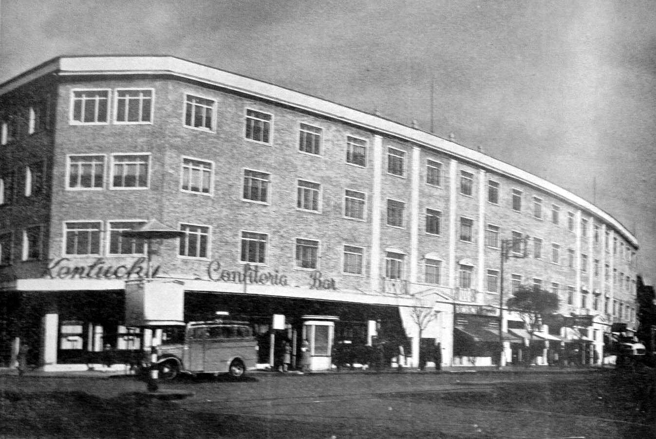 Oficinas del Ferrocarril Bs. As. al Pacífico en Avenida Santa Fe y Godoy Cruz, junto a la estación Palermo. Arquitectos: Aslan y Ezcurra.